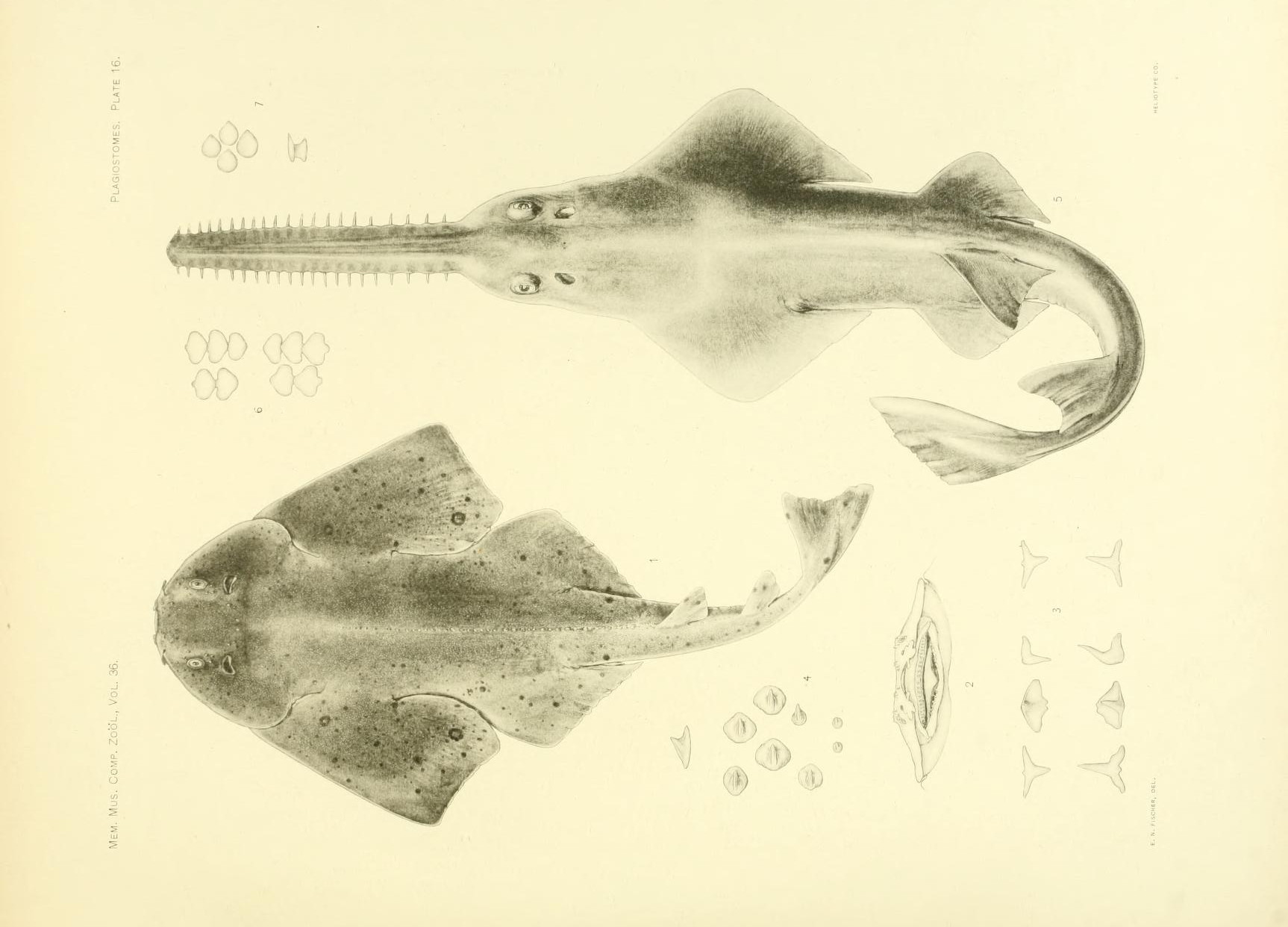 Zwergsägerochen (Pristis clavata) & Pazifischer Engelhai (Squatina californica)